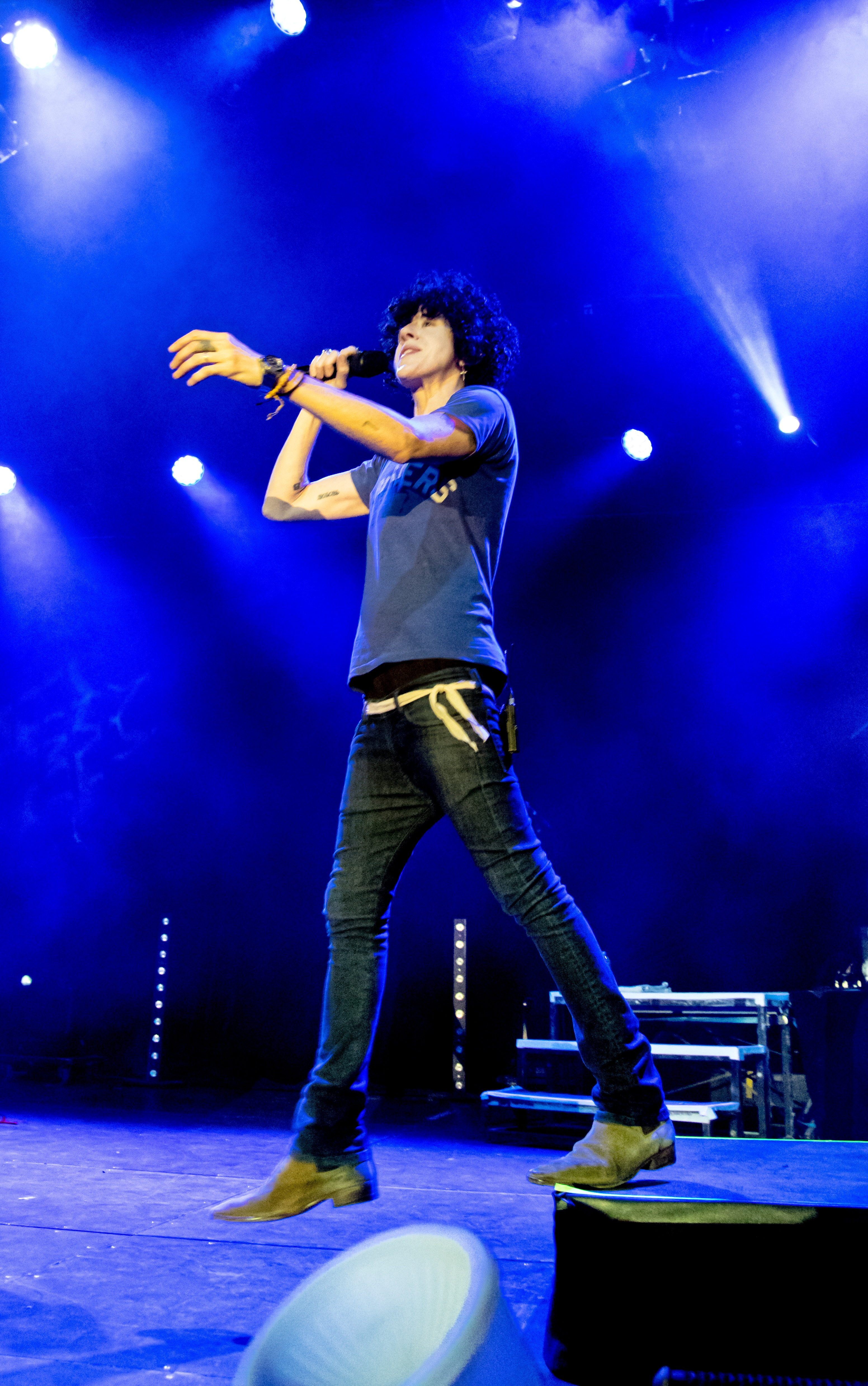 Bilder vom Zelt Musik Festival 2018 in Freiburg im Breisgau LP am 28.07.2018 im Zirkuszelt